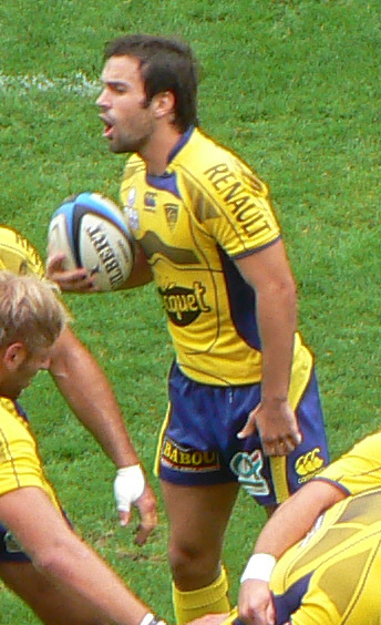 Morgan Parra affronte le Racing Metro 92 avec l'ASM Clermont Auvergne au stade Marcel Michelin à Clermont-Ferrand.